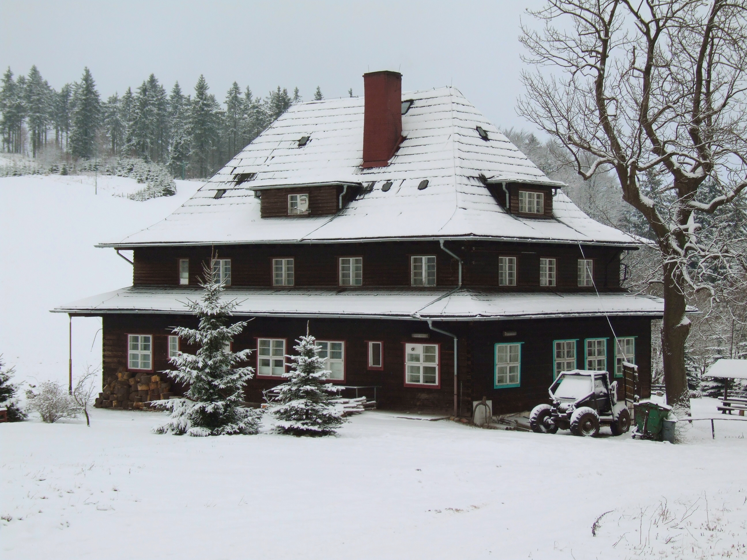 Schronisko Andrzejówka (Andreasbaude) w zimie Ślůnski: Turystyczne schrůńisko Andrzejówka (dowńi Andreasbaude) bez źima, Suche Gůry, Sudety